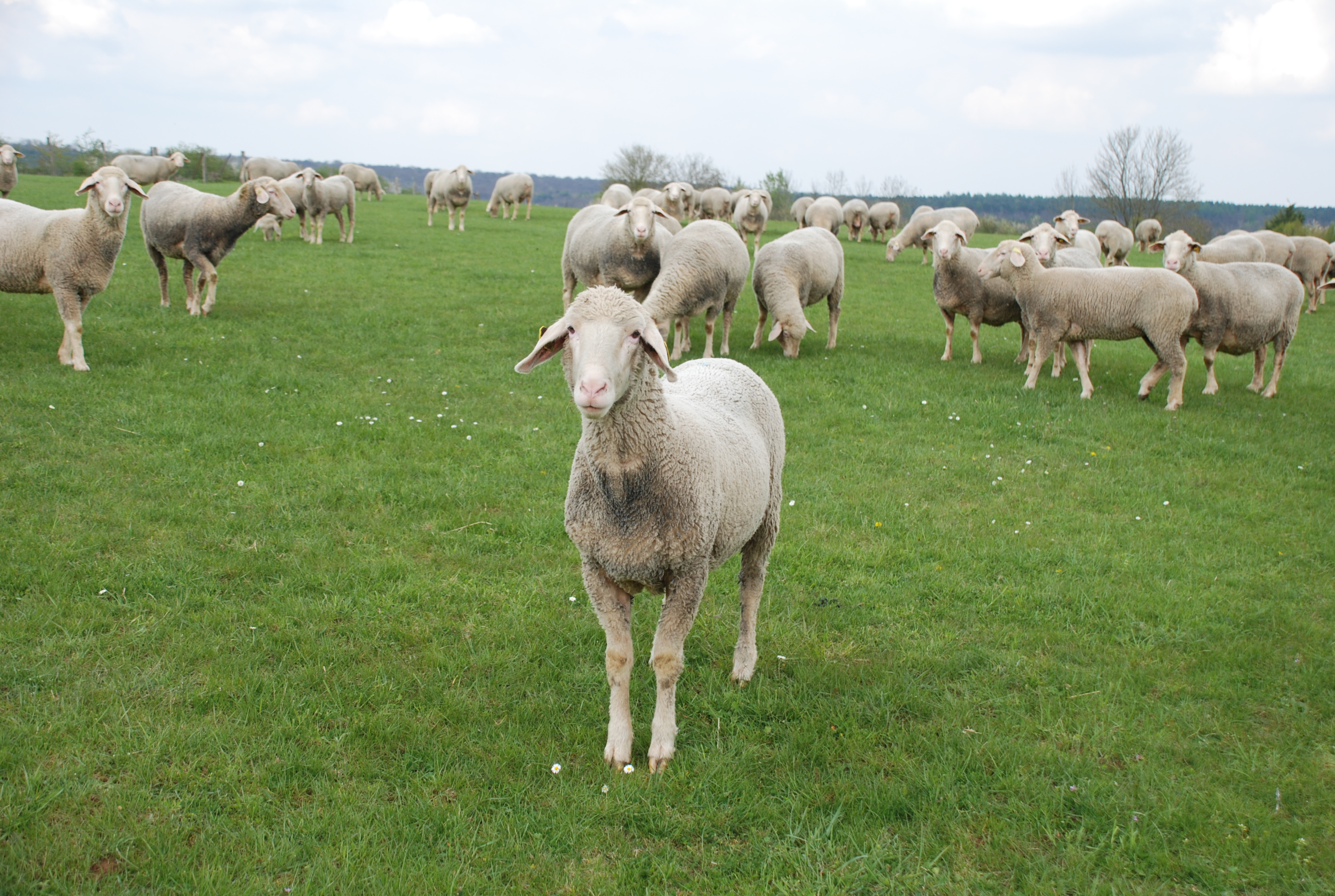 Ovins de la race ovine de l'Est à laine mérinos, élevage Simon, ferme du château, à Prény (Meurthe et Moselle)